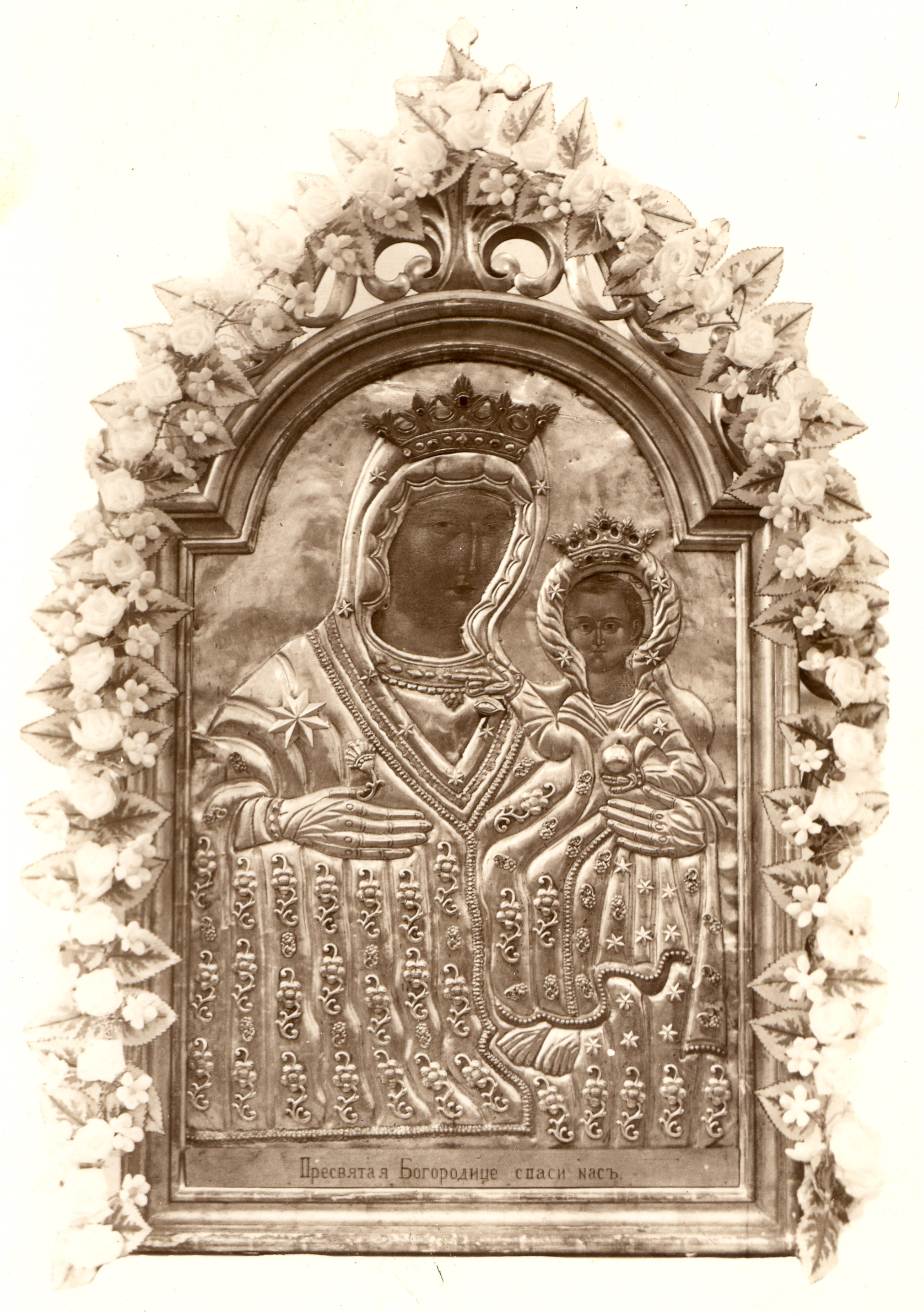 Krásnobrodská monastierska ikona v roku 1915